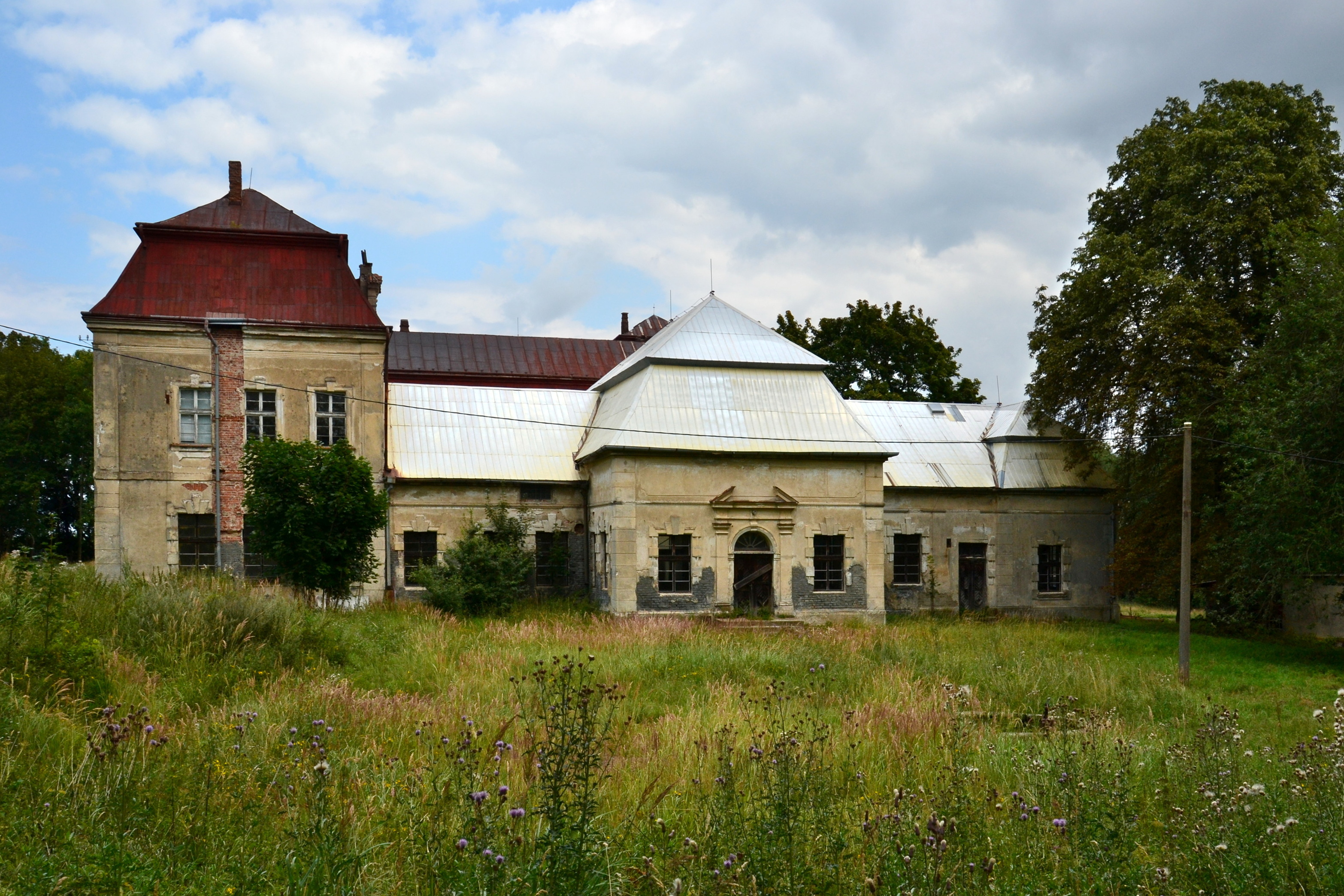 Zámek Velké Dvorce – hospodářské křídlo